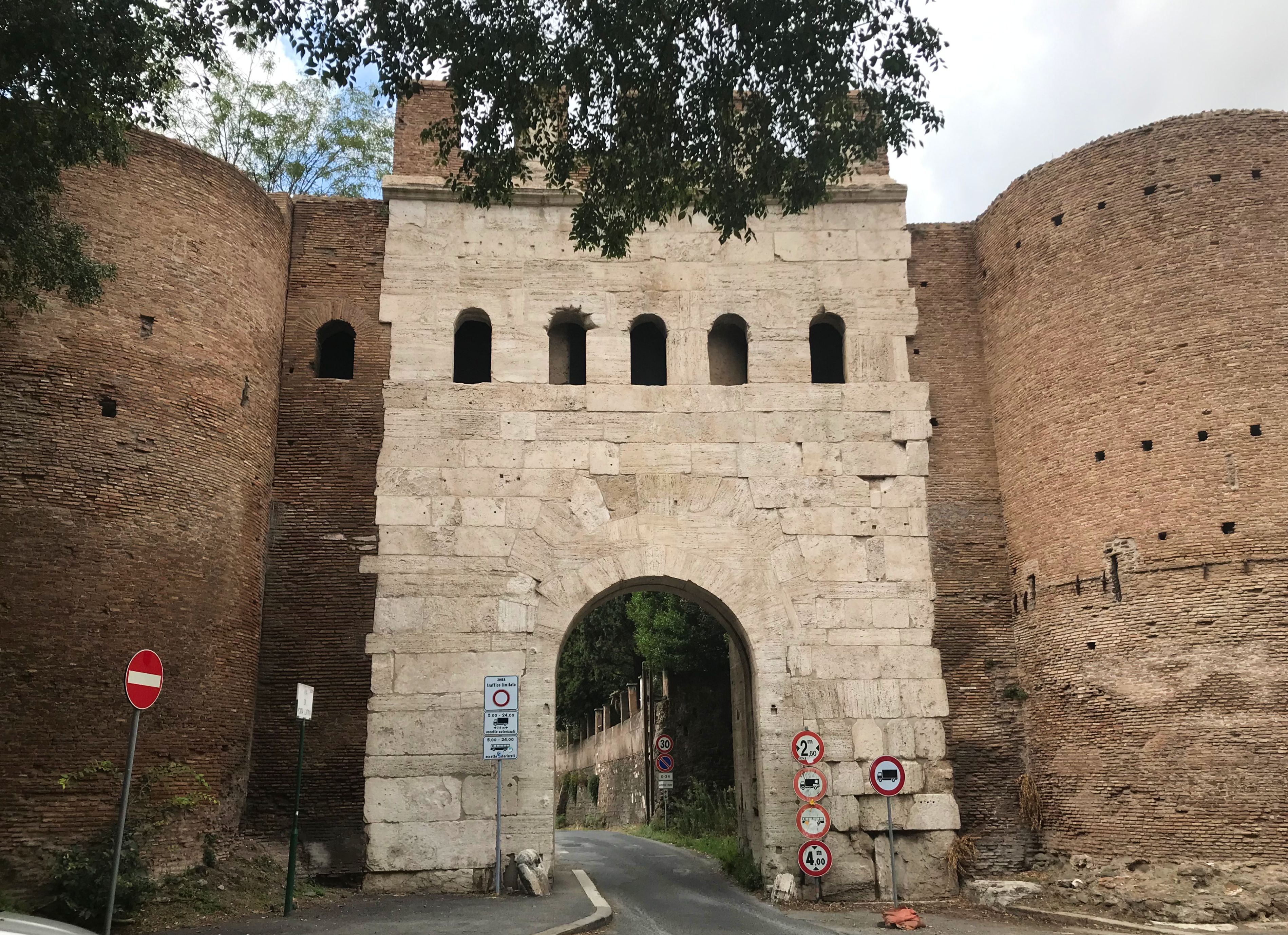 Porta Latina a Roma, Italia